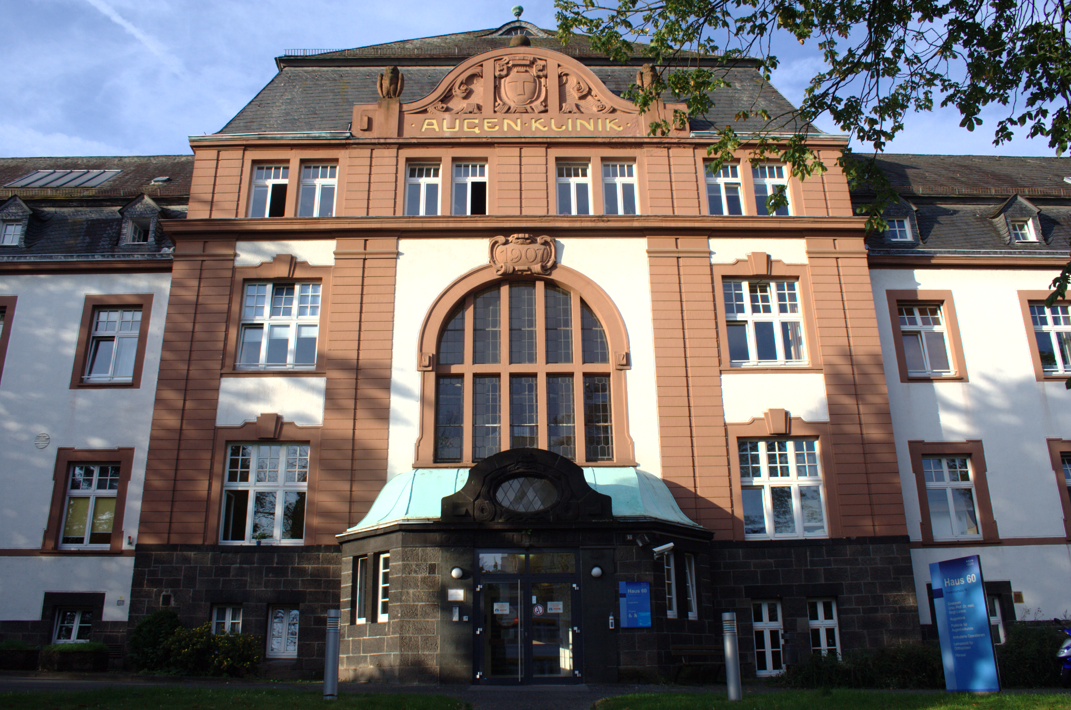 Augenklinik, Friedrichstraße 18, Gießen